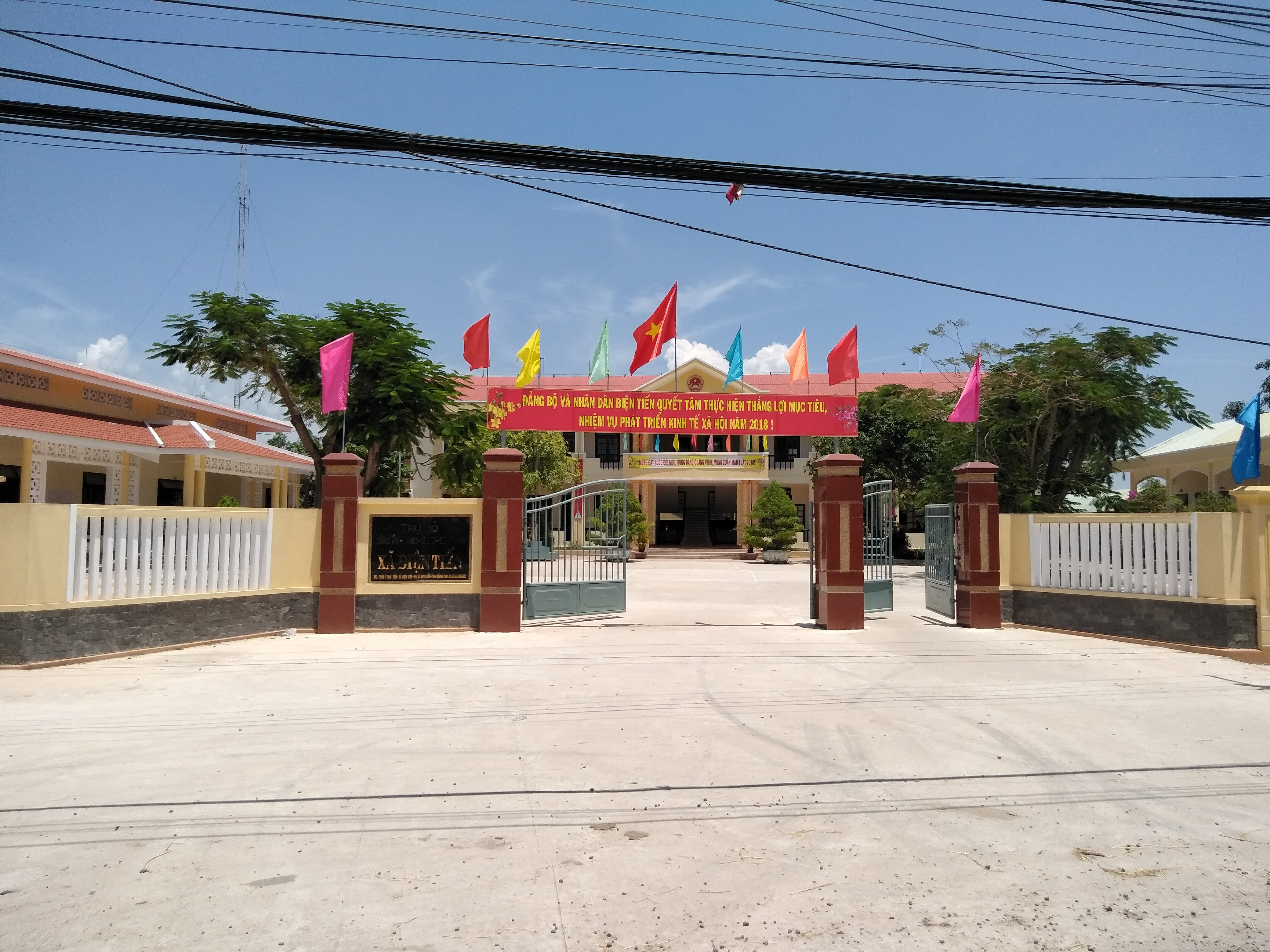 UBND xã Điện Tiến, Điện Bàn, Quảng Nam